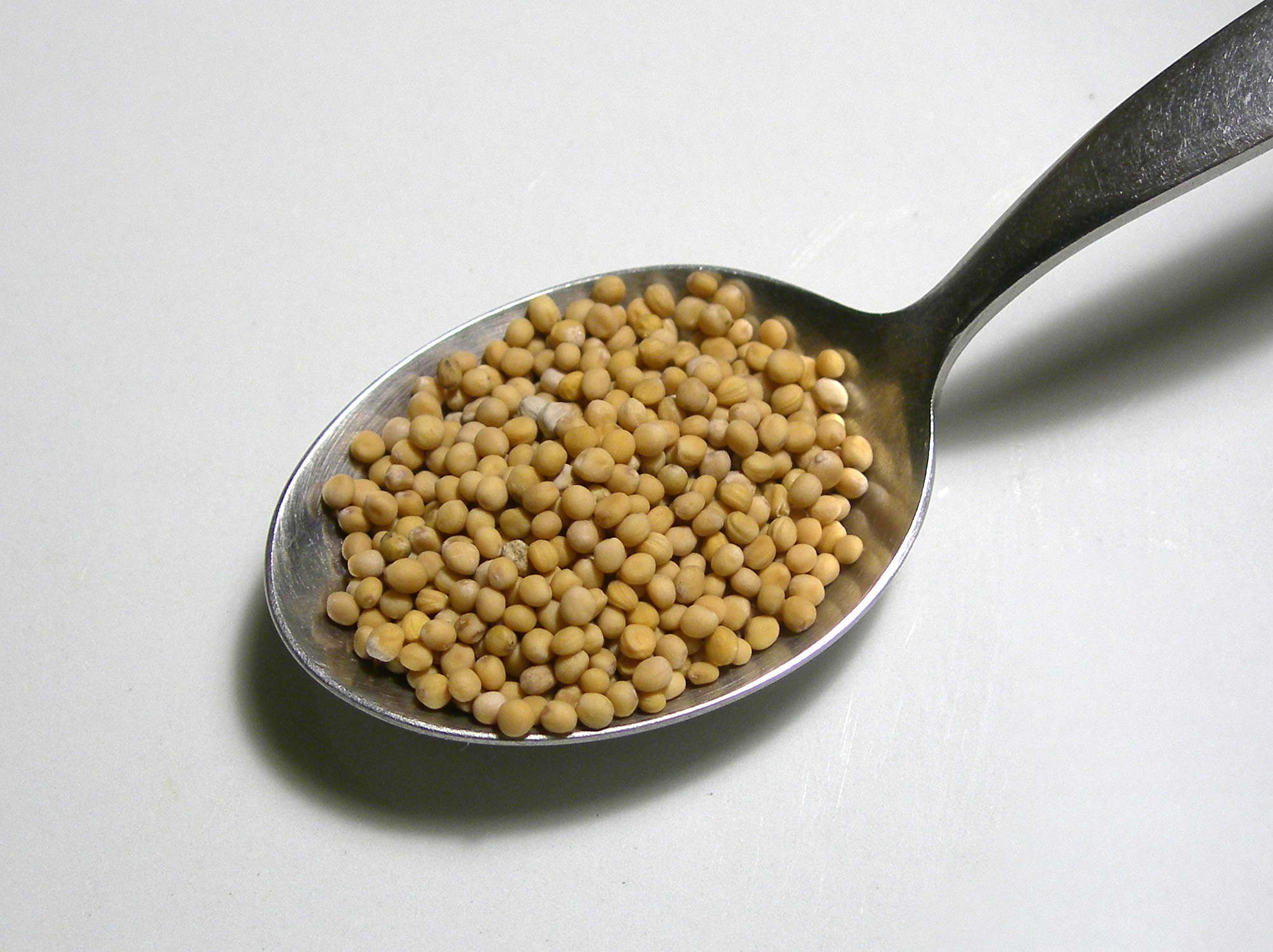 White mustard seeds